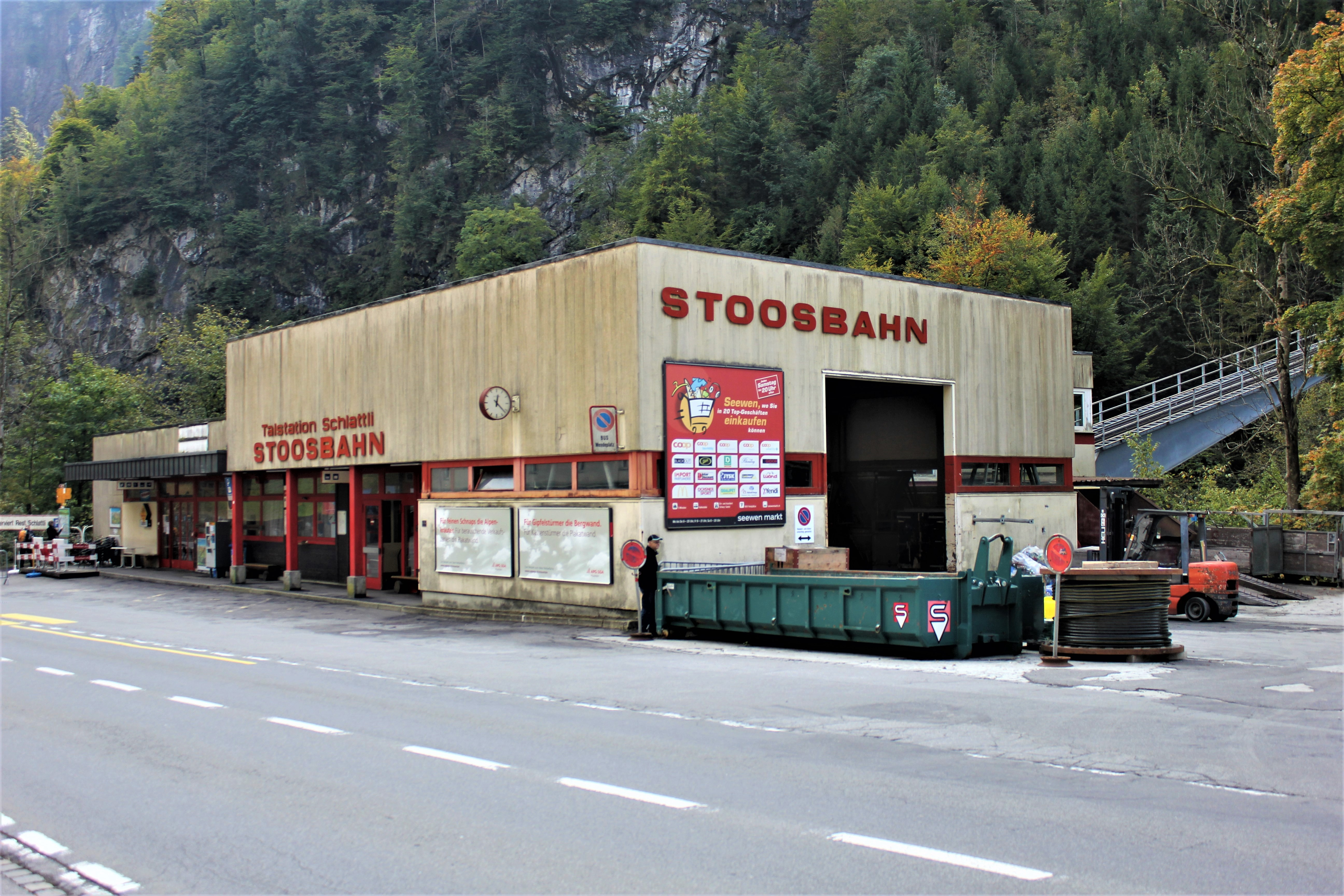 Die Talstation Schlattli der Drahtseilbahn Schwyz–Stoos im letzten Betriebsjahr 2017 vor der Ablösung durch eine neue Bergbahn.